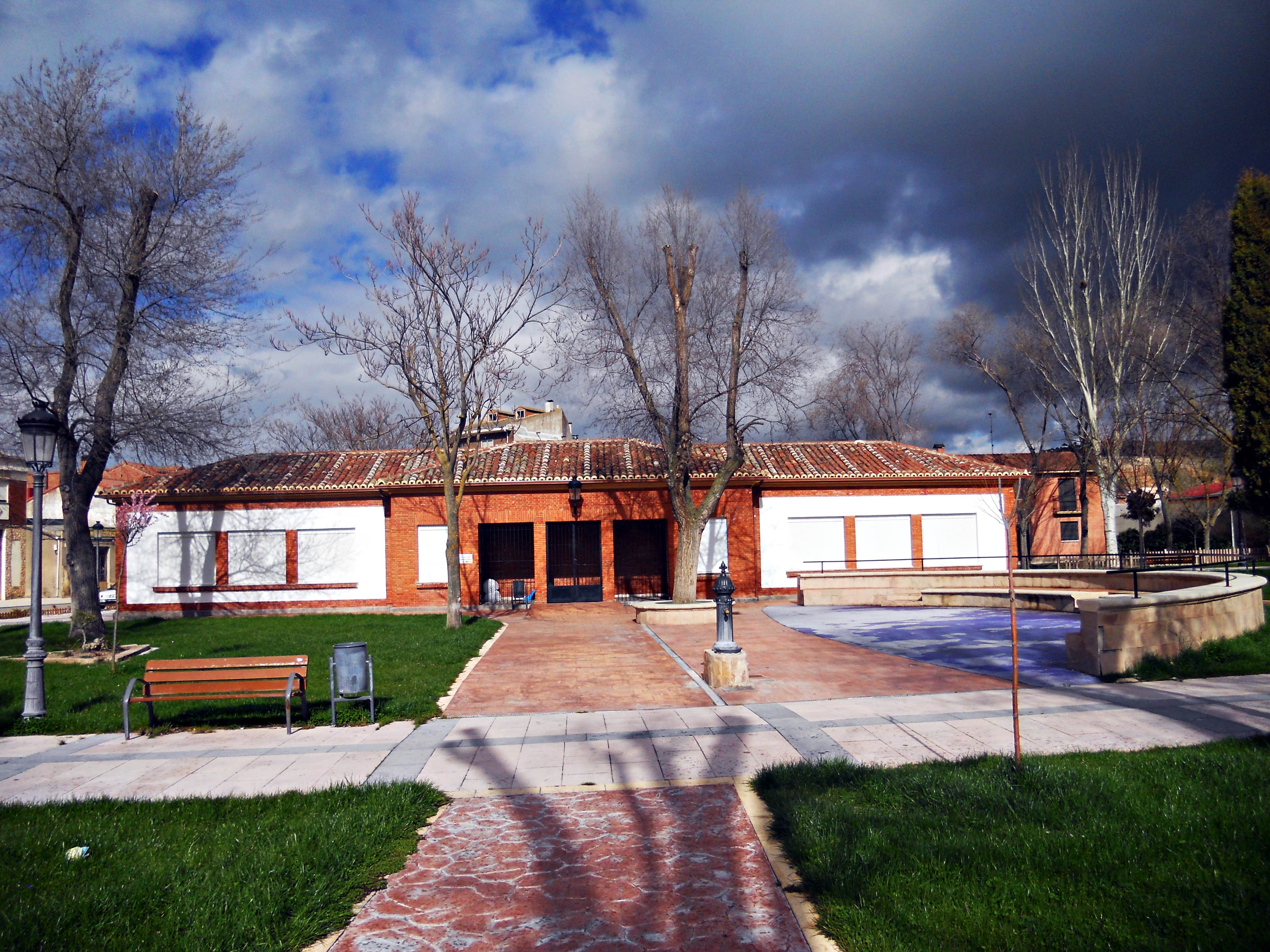 Guardería municipal de Baltanás